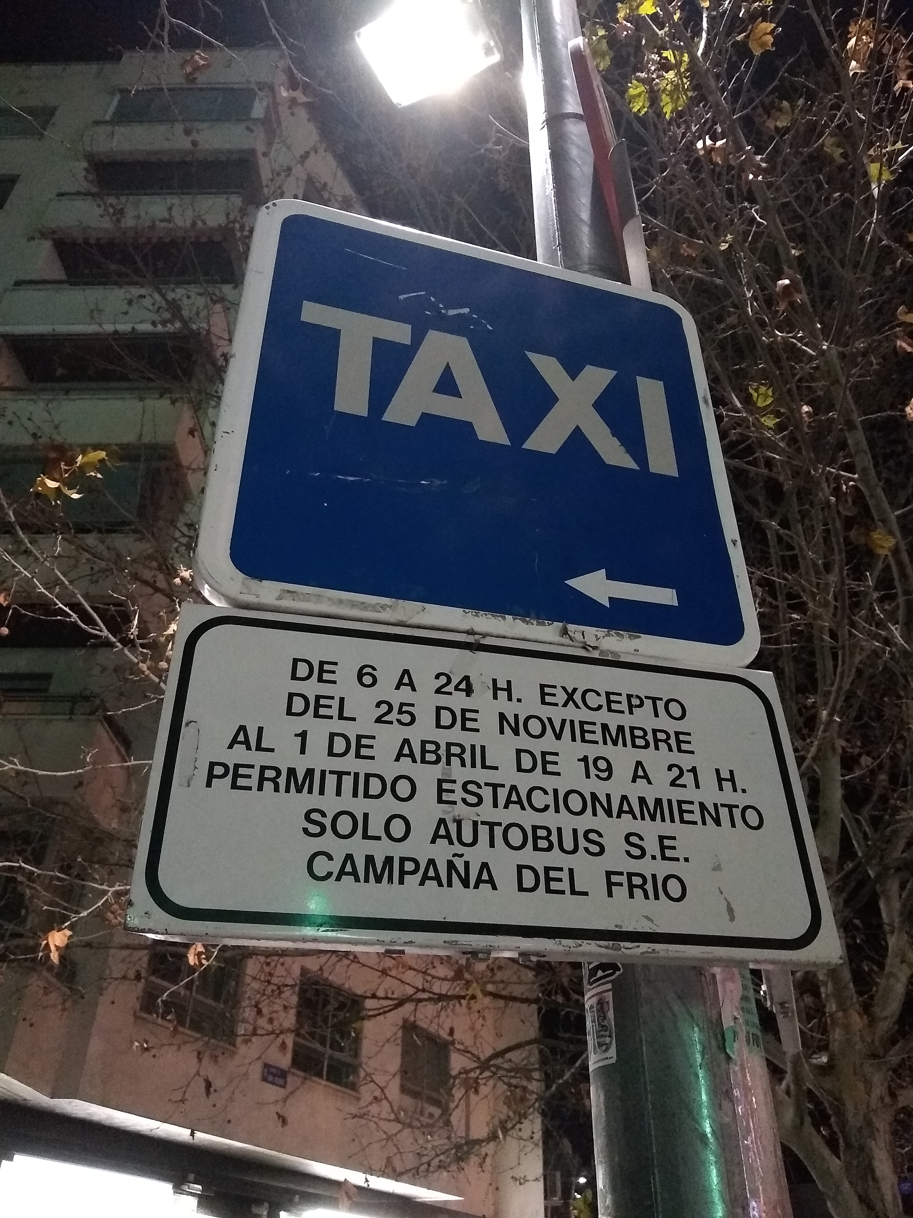 Señal de parada de taxis en la Glorieta de San Vicente (Madrid) en la que se menciona el Servicio Especial de la EMT de la Campaña del Frío